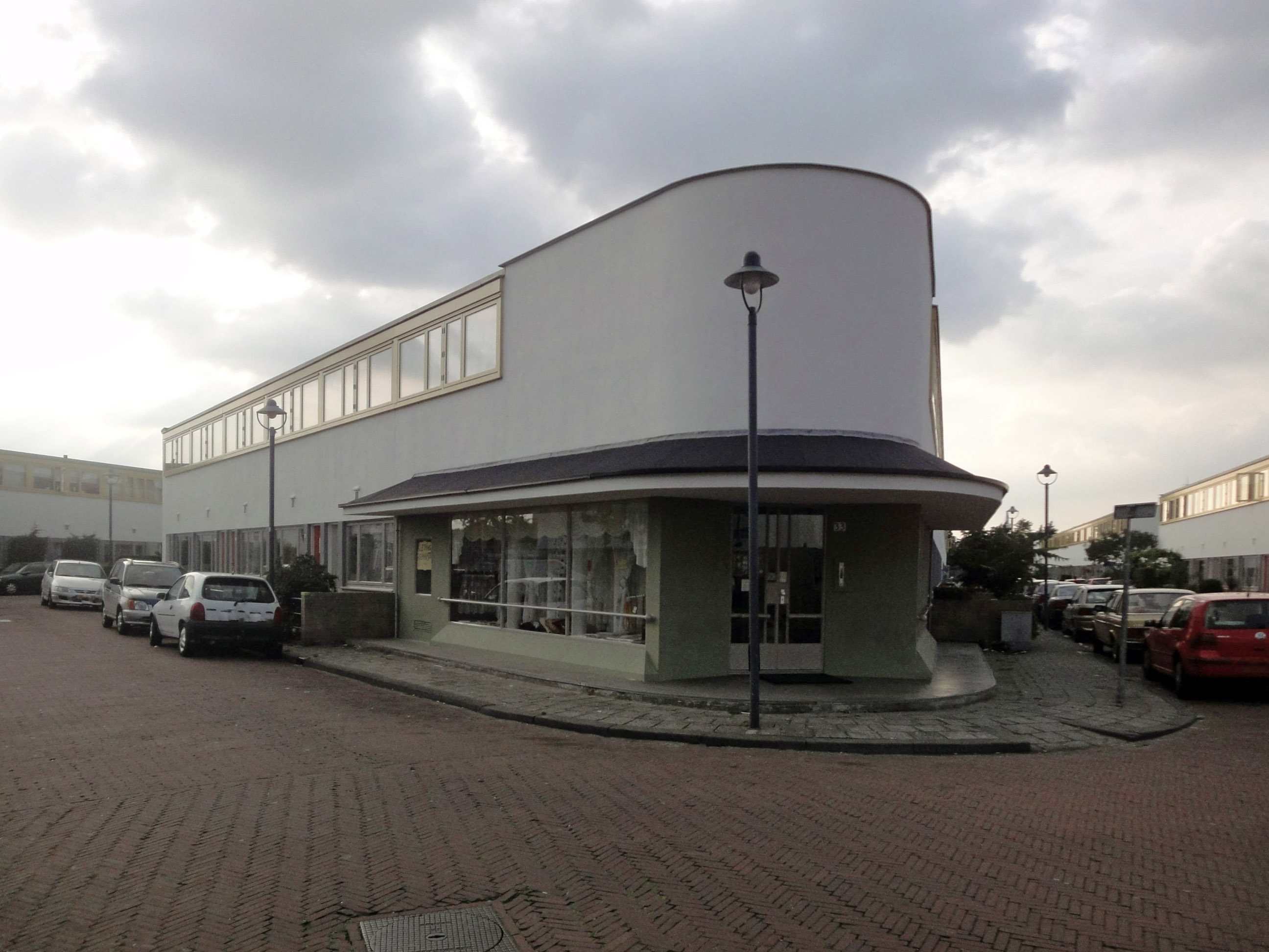 Rotterdam, Kiefhoek complex. Rijksmonument.